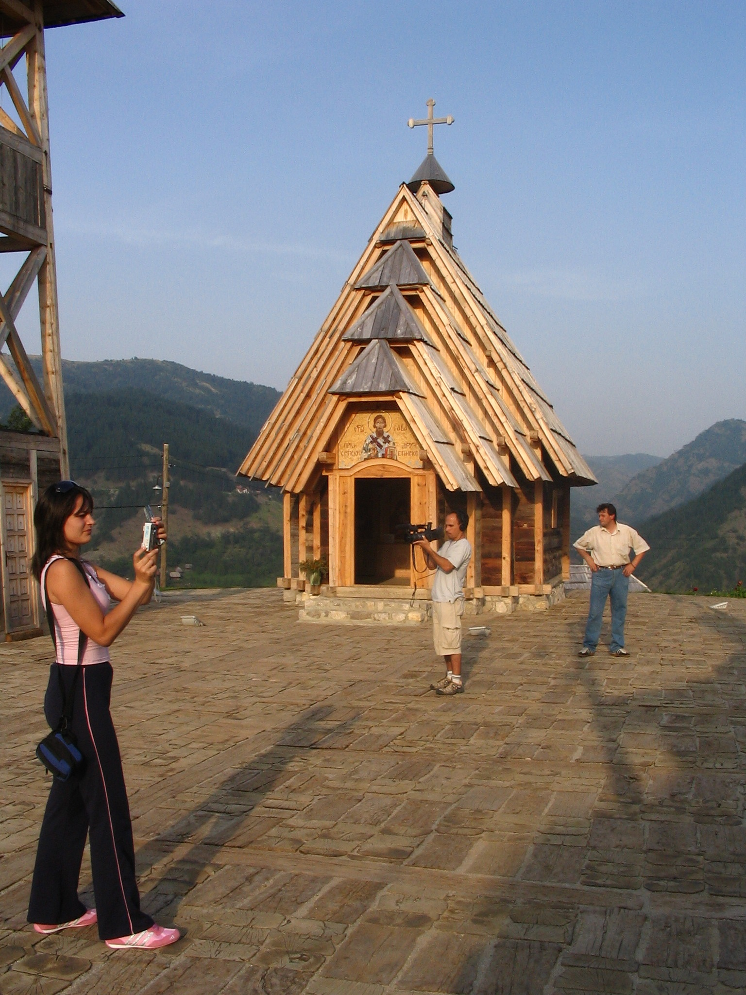 הכפר של קוסטוריצה, מתוך הסרט "חלום קוסטוריצה", בבימויו של איל סיבי, 2013